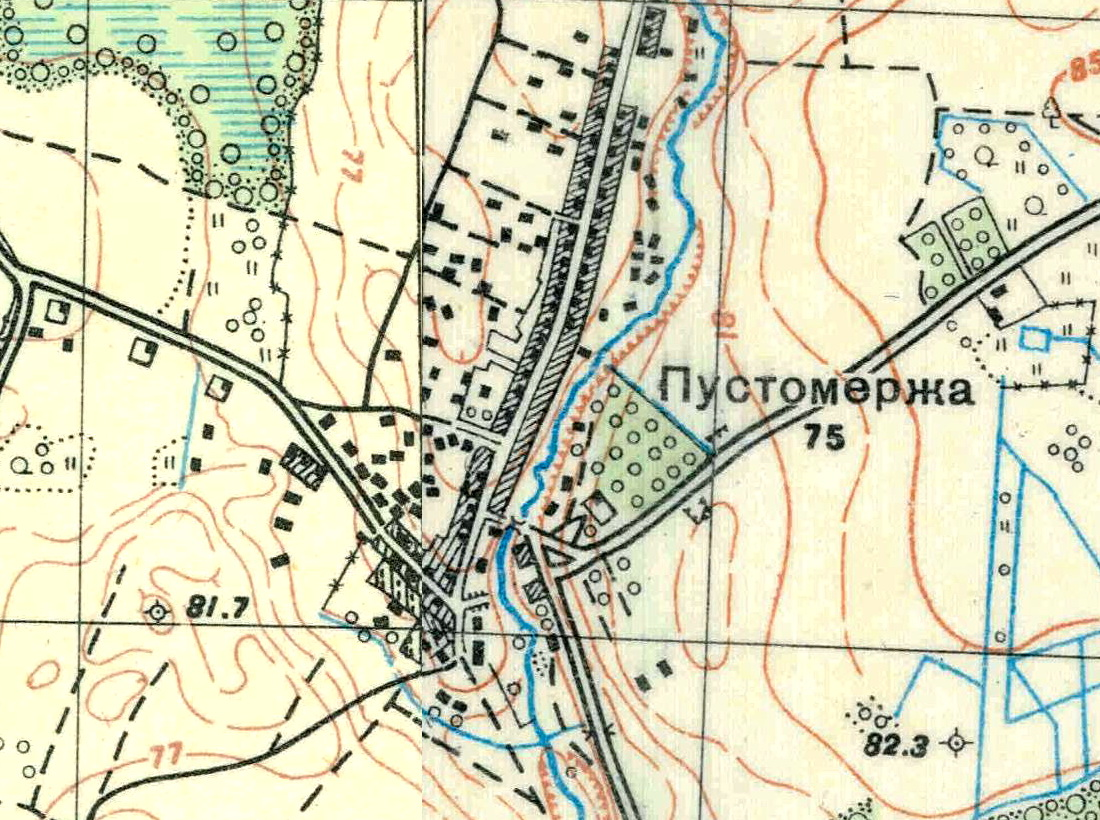 Топографическая карта Ленинградской области, квадрат О-35-22-Г-в (Мануйлово), деревня Пустомержа.